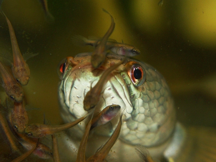 Channa gachua: Männchen mit Jungen